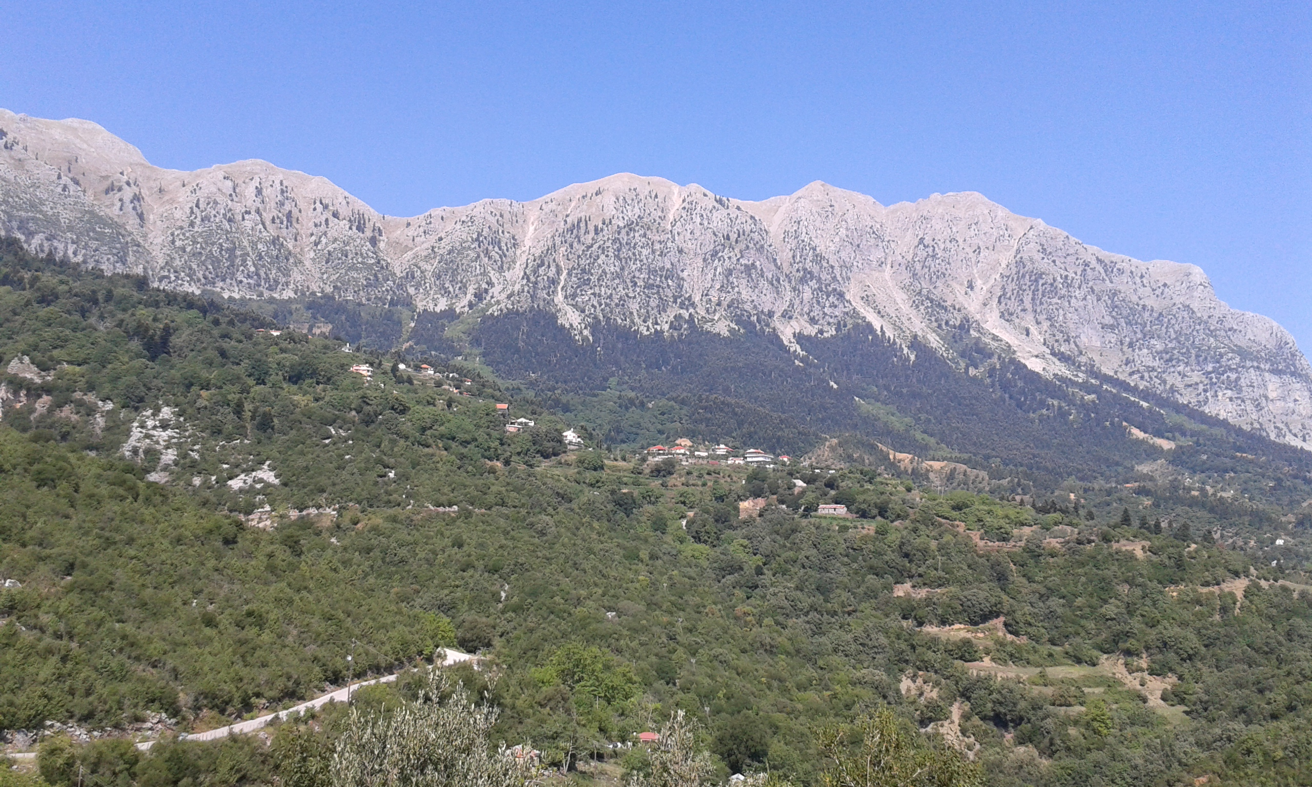 Μεγαλόχαρη Άρτας